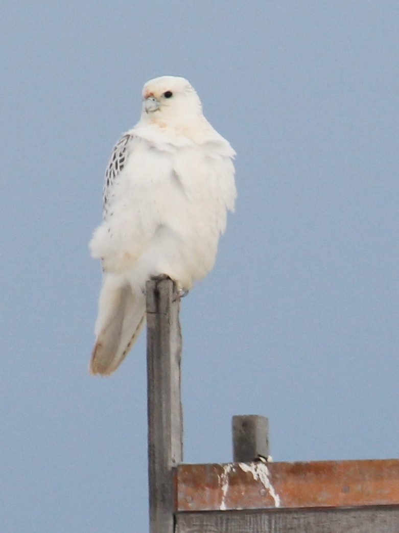 Gyrfalcon